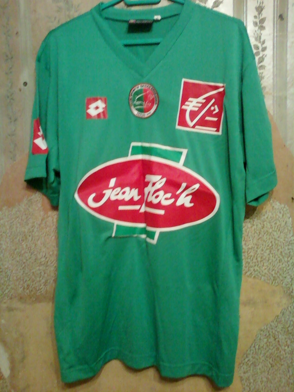 Maillot home du CS Sedan saison 2003-2004